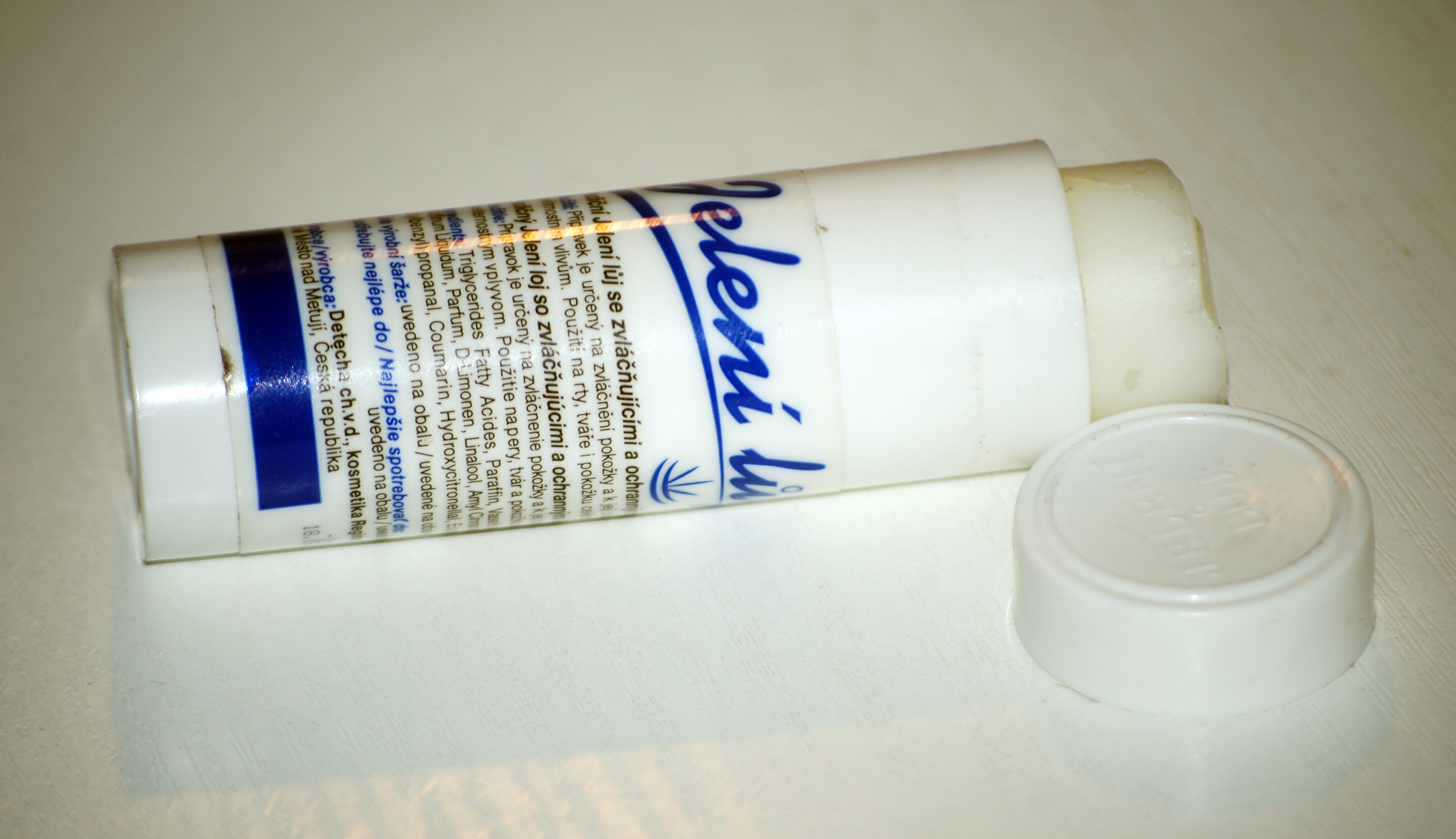 Hirschtalgstift